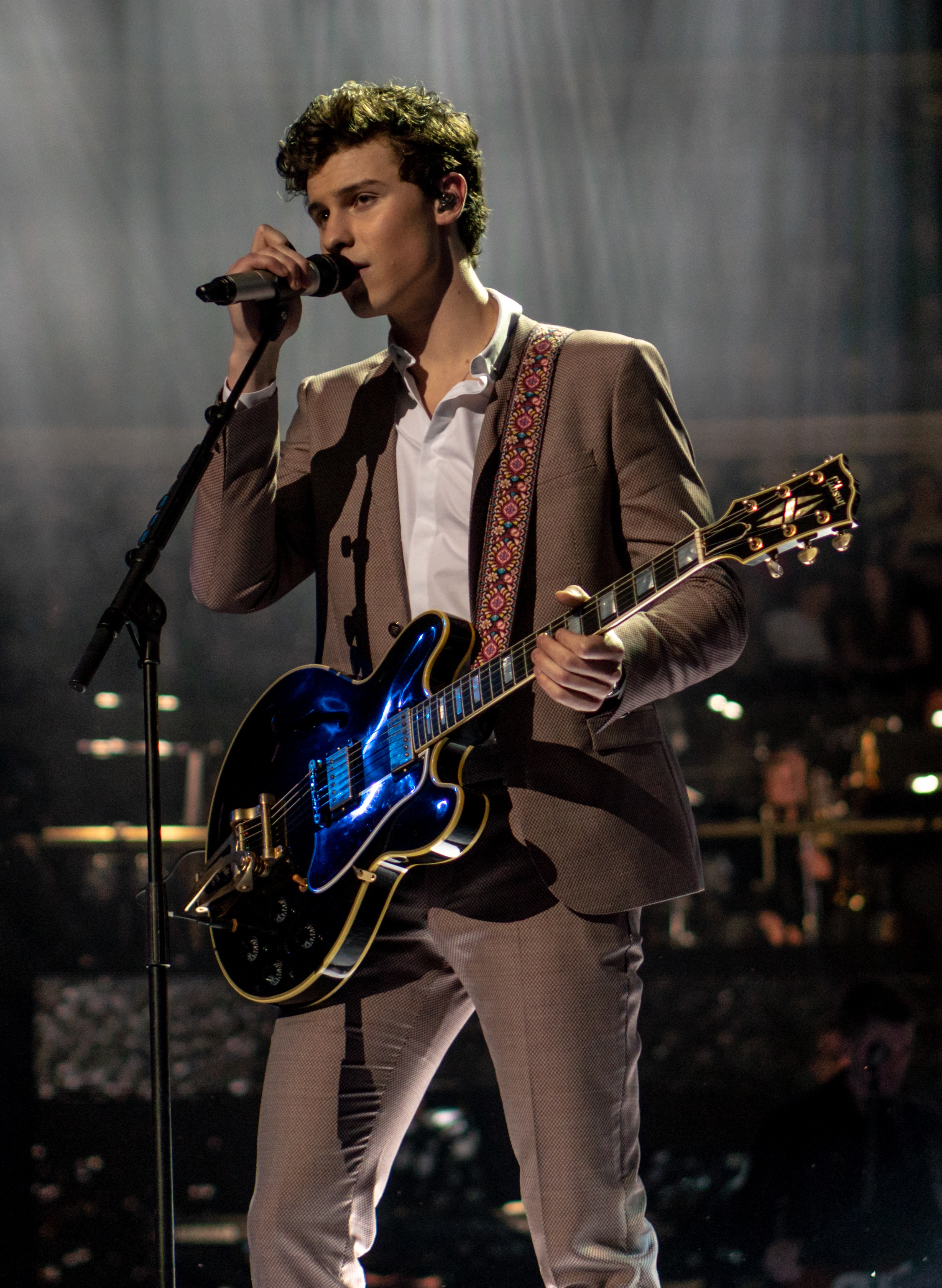 QueenbdayRAH210418-26